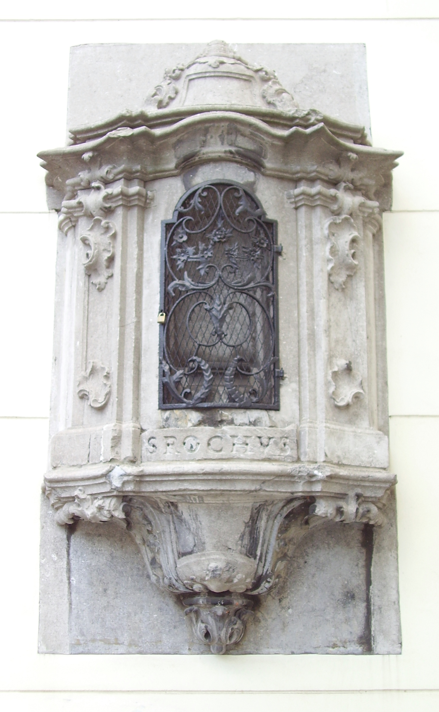 Potale Saint Roch, Invoquée pour la protection contre la peste, au coin du Quai aux Briques et de la Rue du Pays de Liège, Bruxelles